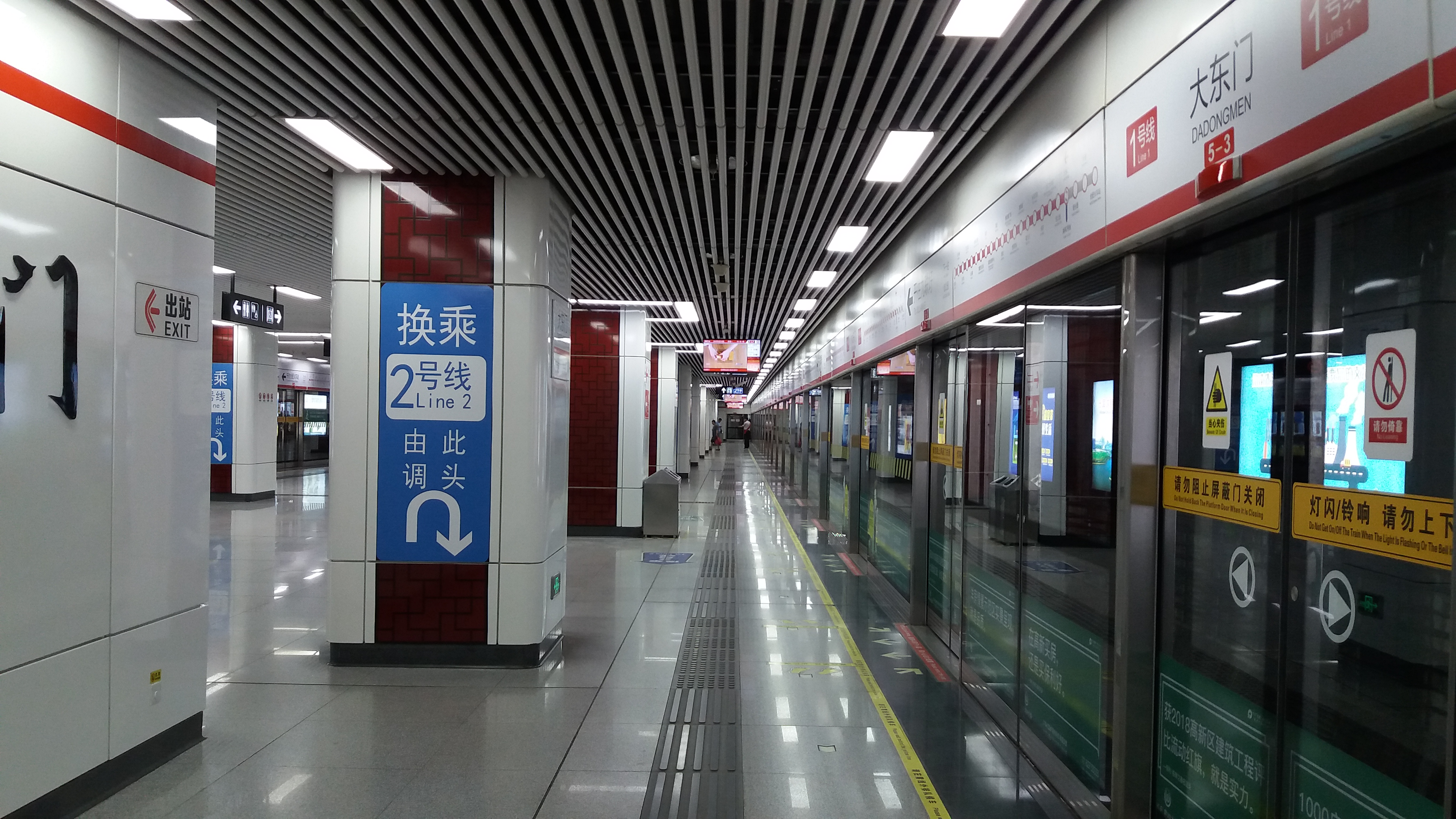 Dadongmen Station